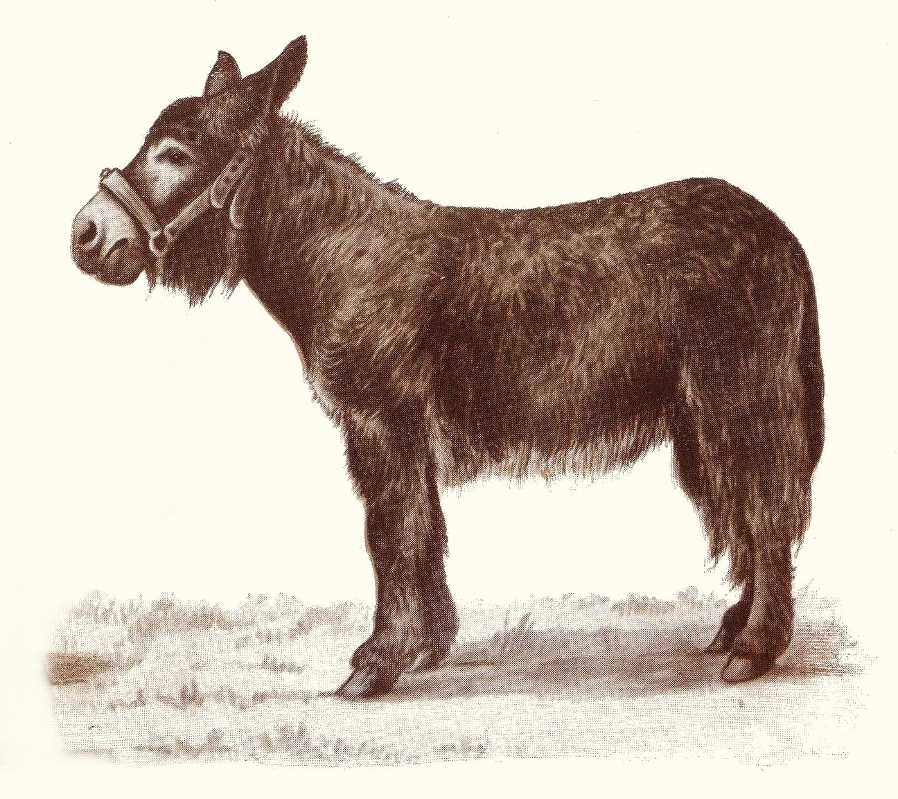 Détail de l'âne du Poitou